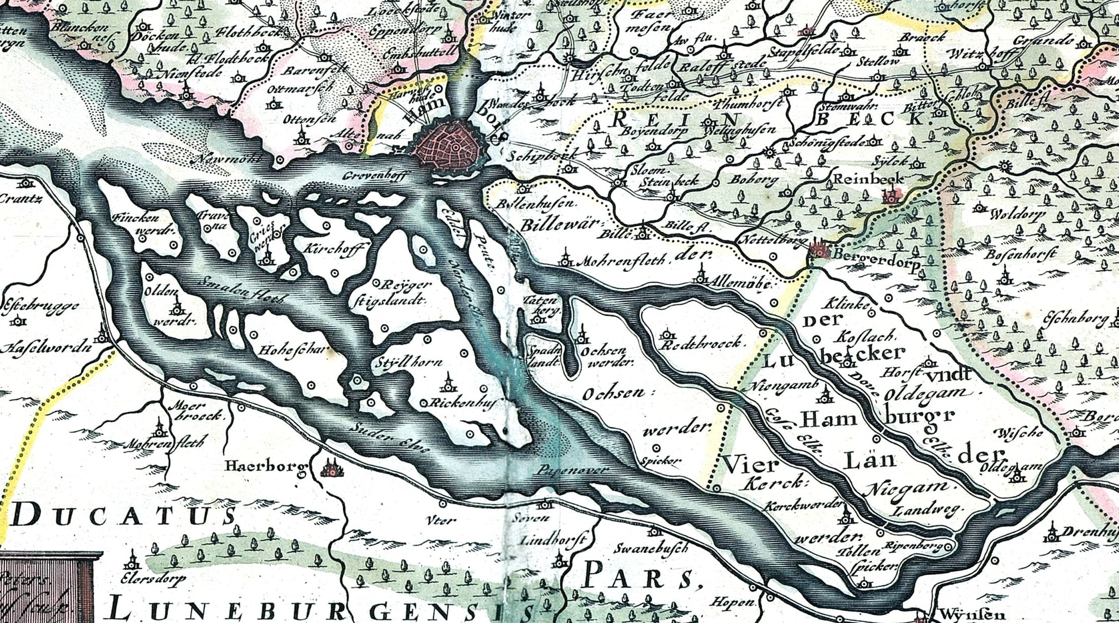 Elbinseln bei Hamburg um 1650 - Ausschnitt aus File:Joh Mejer Stormarn 1650.jpg